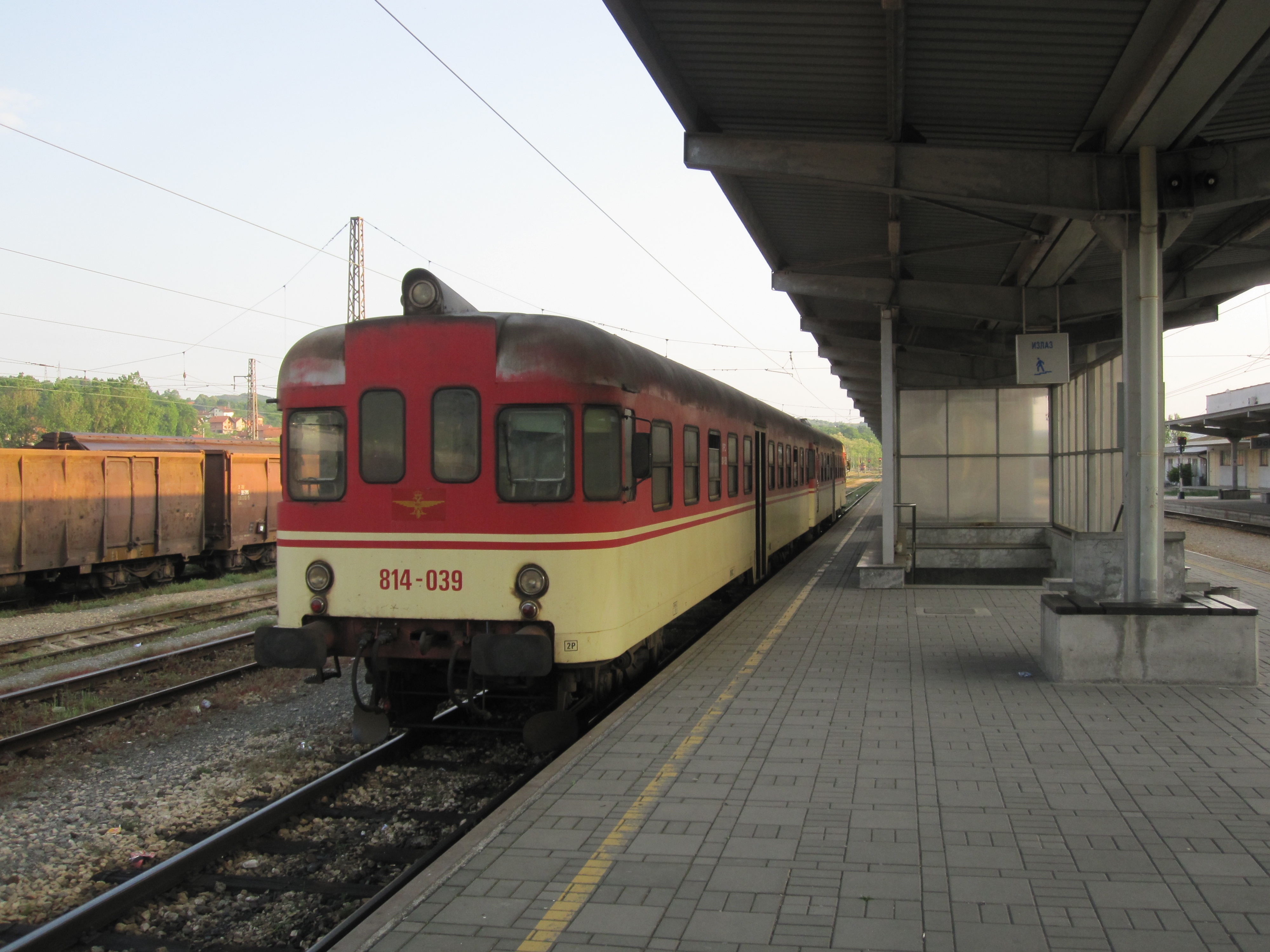 13.05.11 Doboj ŽRS 814.039